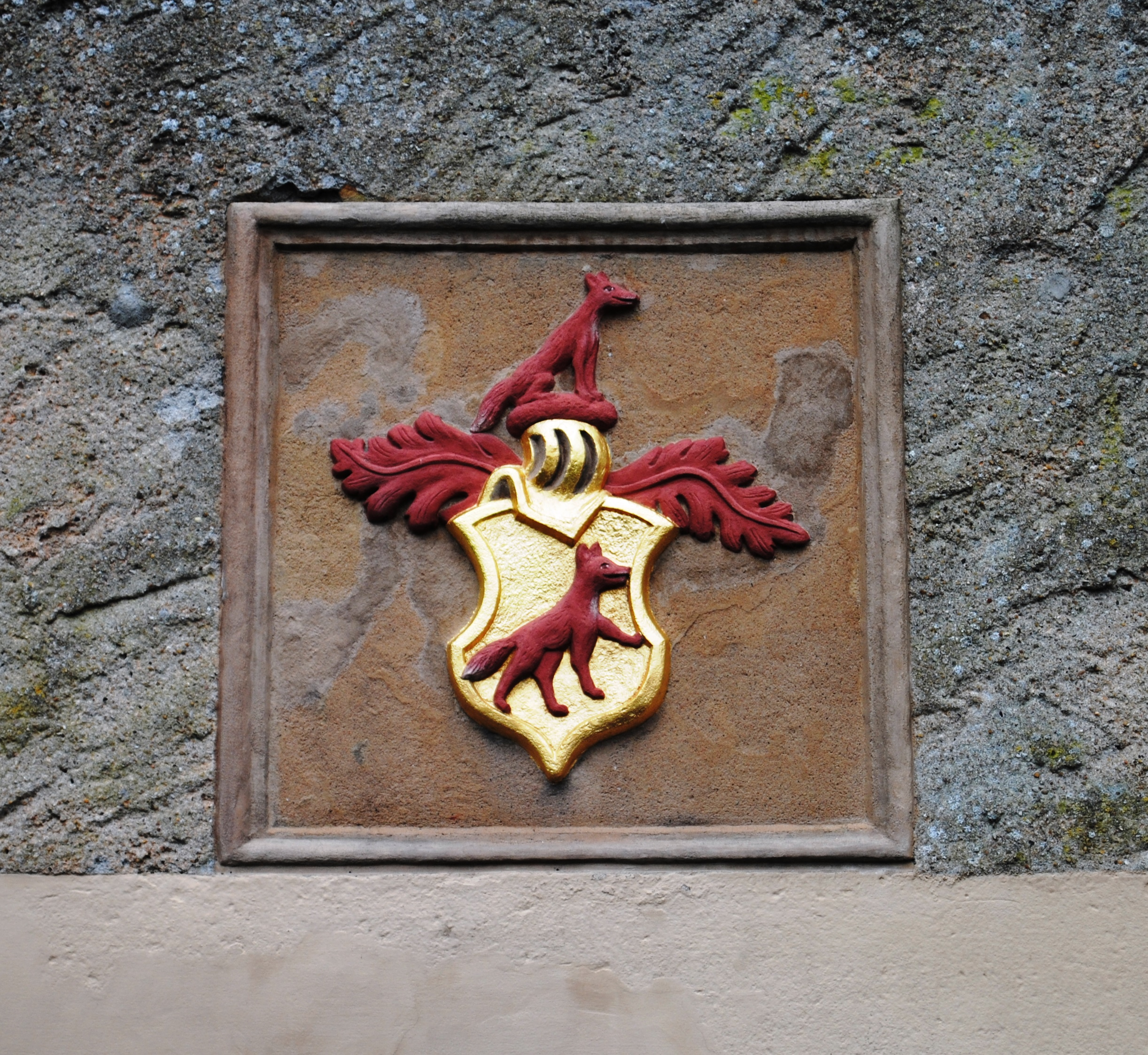 Wappenstein Adelsgeschlecht Fuchs von Bimbach zu Neuses am Sand, Schloss Neuses am SandThis is a photograph of an architectural monument.